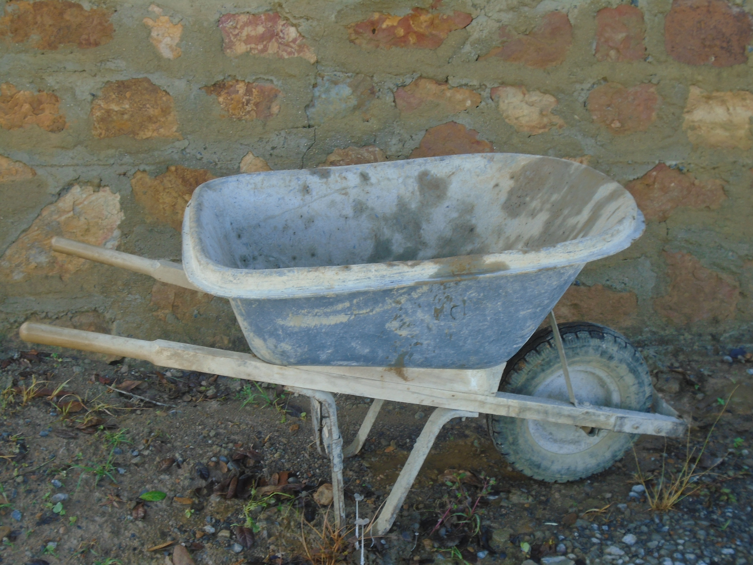 Una carretilla.